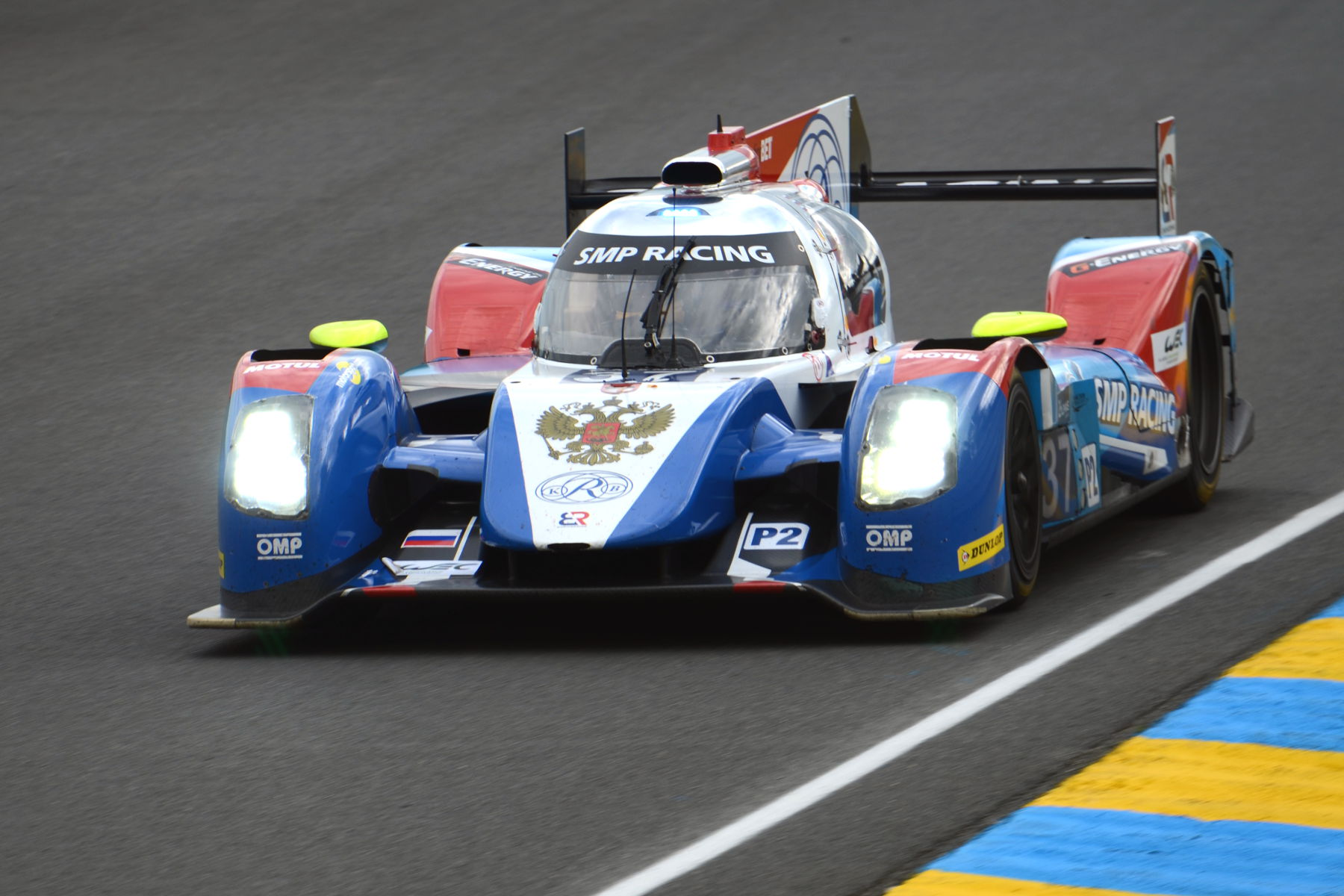 La BR01 - Nissan de l'écurie SMP Racing pilotée par Vitaly Petrov, Viktor Shaitar et Kirill Ladygin lors des 24 Heures du Mans 2016